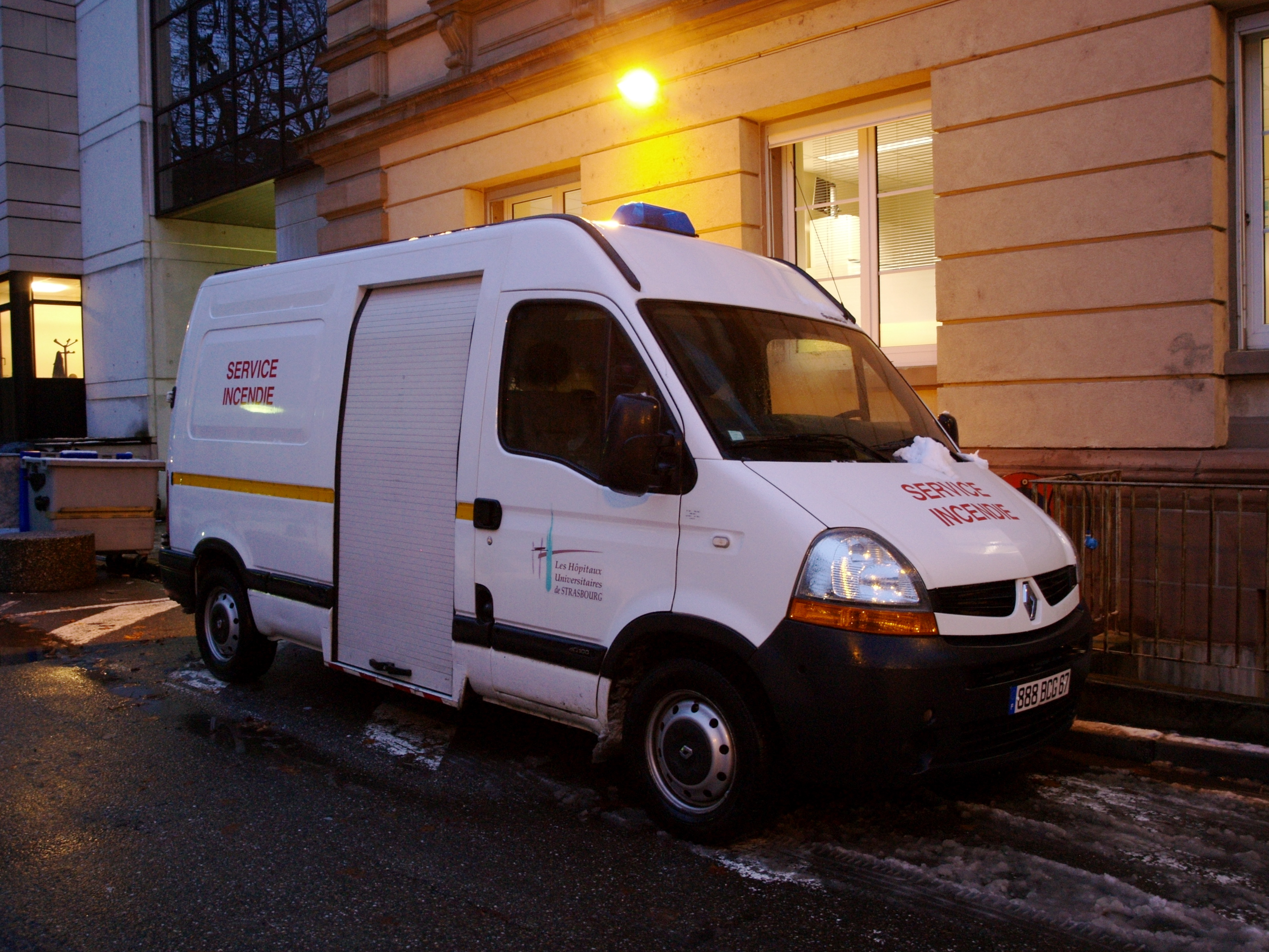 Une camionette du service incendie des hopitaux universitaires de Strasbourg